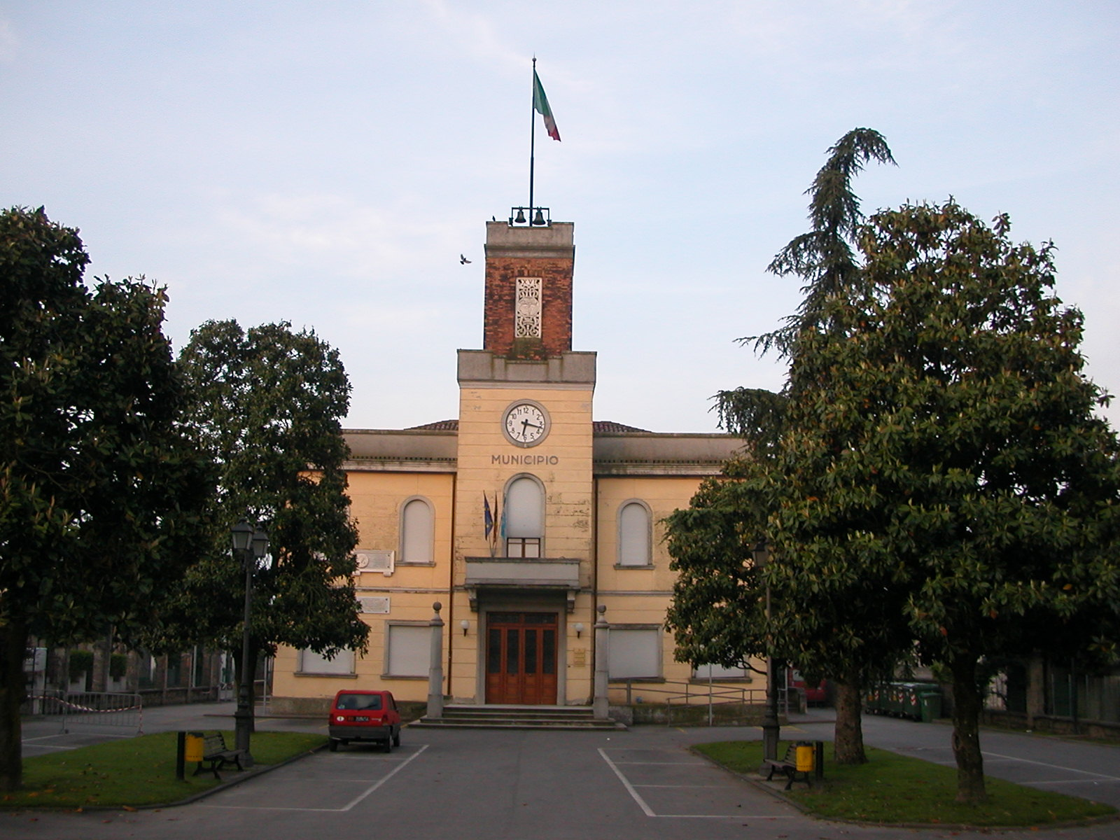 Municipio, sede dell'amministrazione comunale di Pettorazza Grimani, provincia di Rovigo.